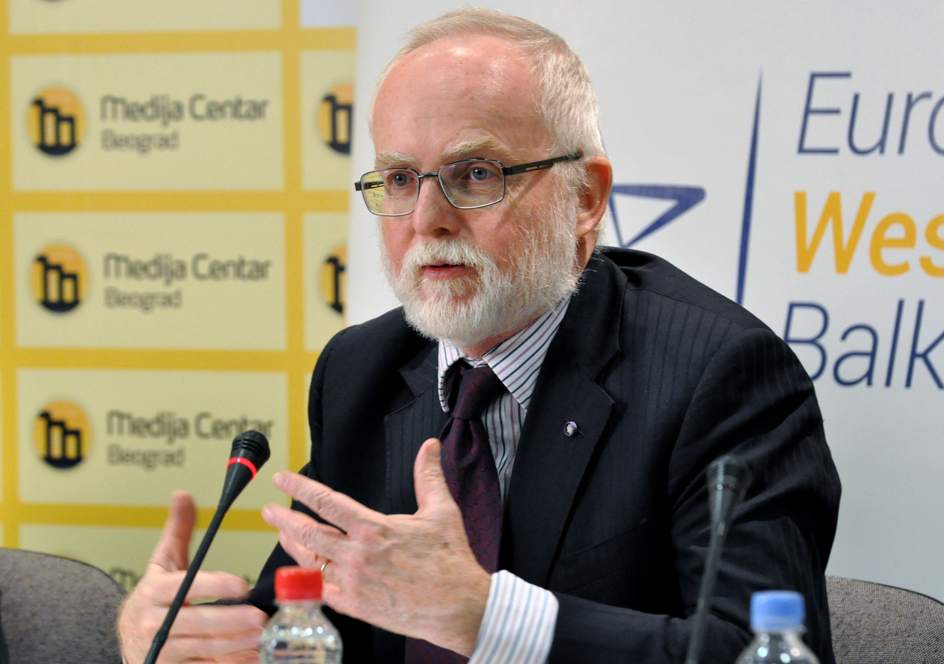 Denis Kif britanski ambasador